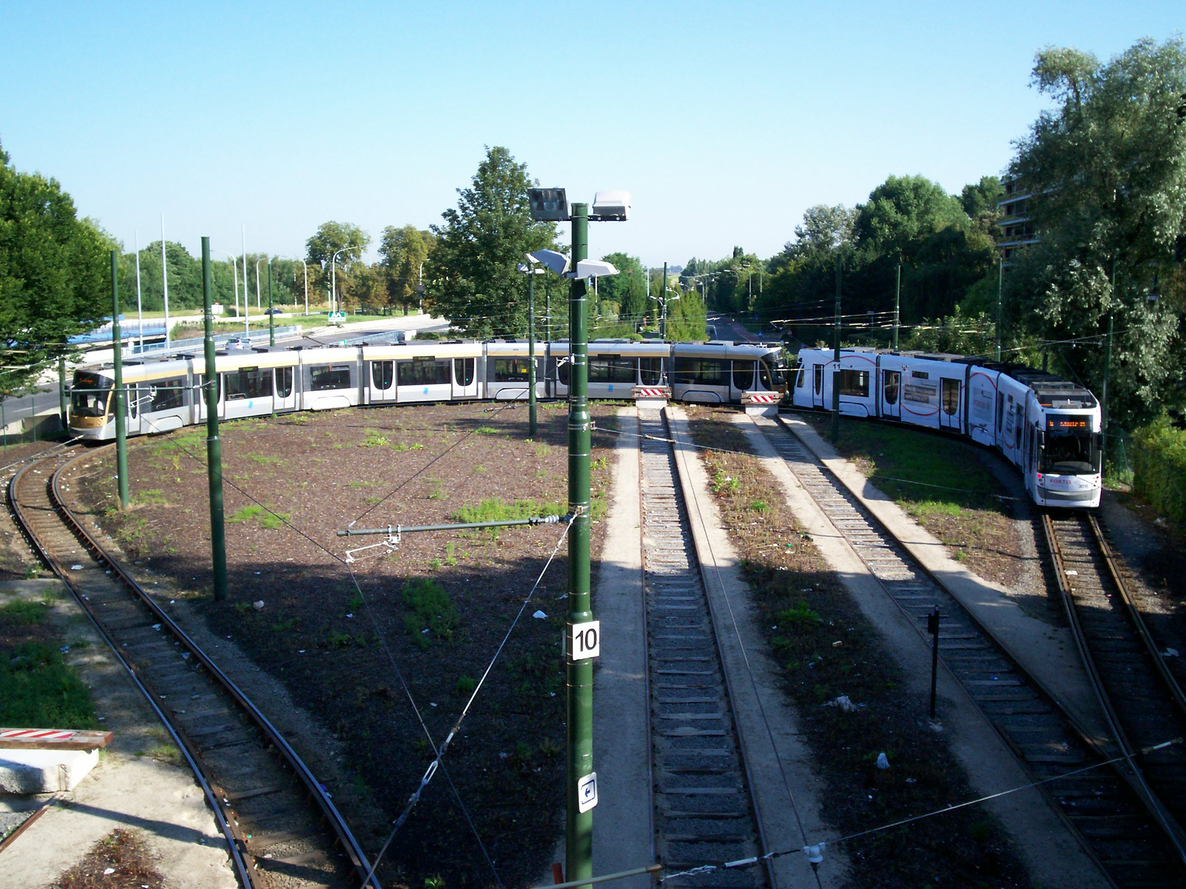 Une rame T4000 et une rame T3000 pelliculé dans la boucle de retournement de "Esplanade" sur la ligne 4